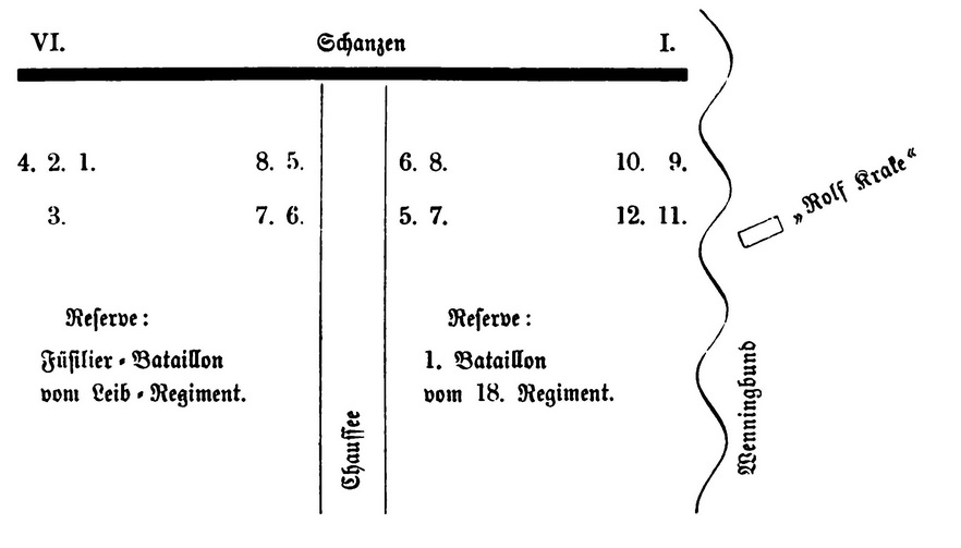 Skizze zur Schlachtordnung der Preußen vor dem Angriff auf die Düppeler Schanzen; rechts auf dem Meer ist das dän. Turmschiff "Rolf Krake" eingezeichnet. Die Zeichnung ist geostet (Norden links, Osten oben).